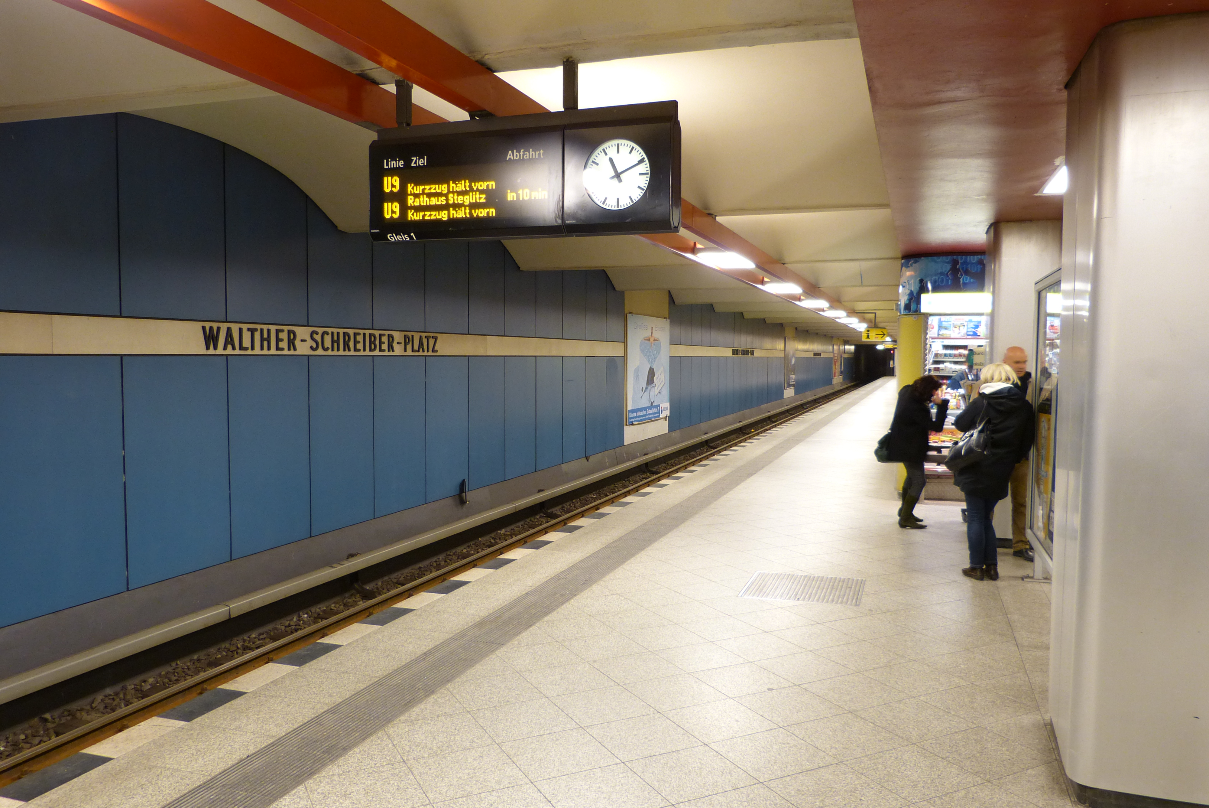 Berlin U-Bahnhof Walther-Schreiber-Platz, Bahnsteig mit heller Pflasterung